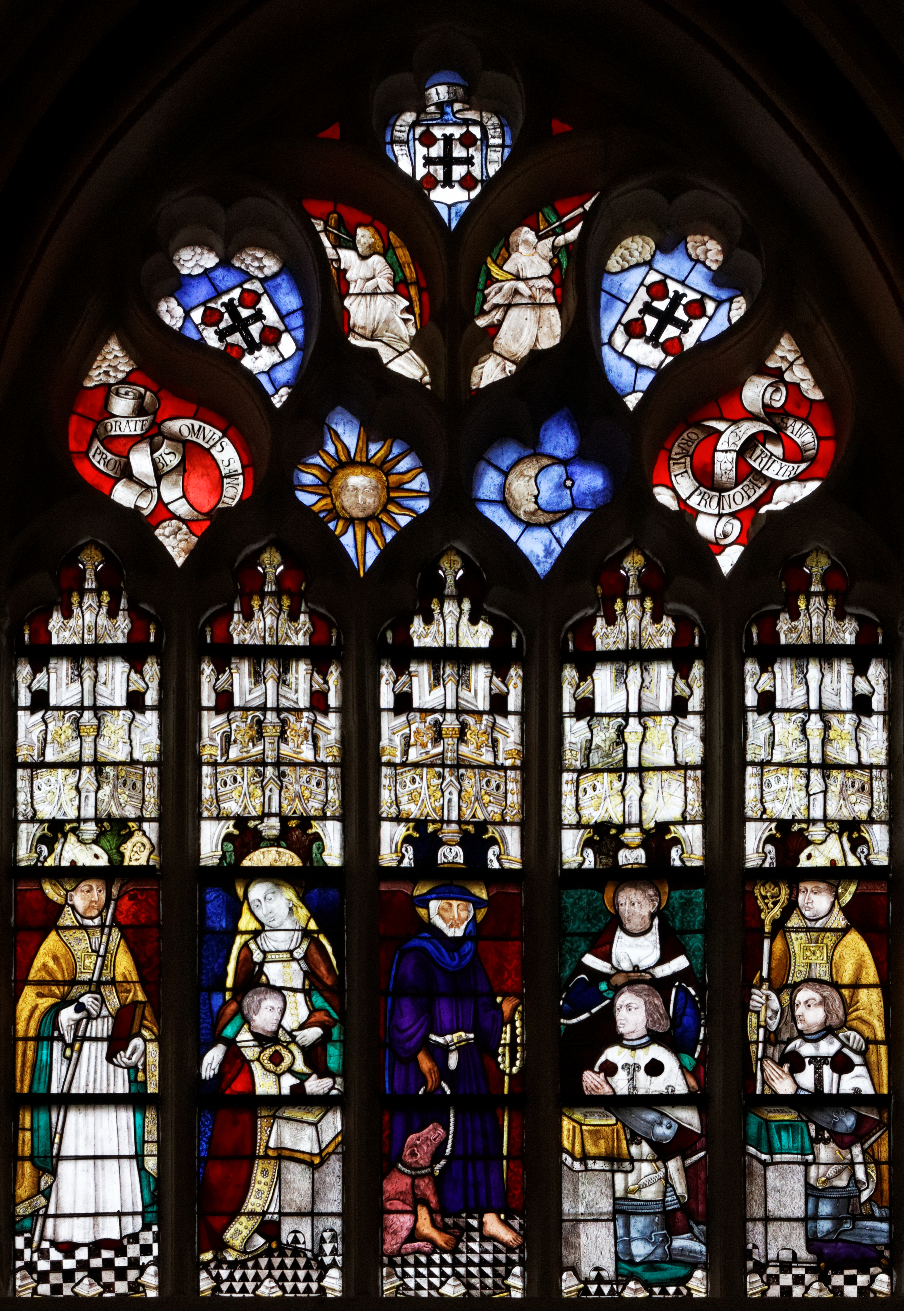 Baie 125 de la cathédrale Saint-Corentin à Quimper dans le Finistère. Verrière haute nord de la 4ème travée de la nef.Vitrail du Dresnay. 1ère lancette: saint évêque. 2ème lancette: le chanoine Yves du Dresnay présenté par une sainte. 3ème lancette: Saint-Hervé. 4ème: chevalier du Dresnay présenté par Saint-Yves. 5ème: chevalier présenté par un saint évêque. Tympan: armes des du Dresnay (d'argent à la croix ancrée de sable accompagnée de quatre coquilles de gueules). Devise: Dieu le veult. Phylactères: Omnes sancti orate pro nobis (tous les saints priez pour nous), Sancti martyres orate pro nobis (saints martyrs priez pour nous). Soleil et Lune. Anges buccinateurs.